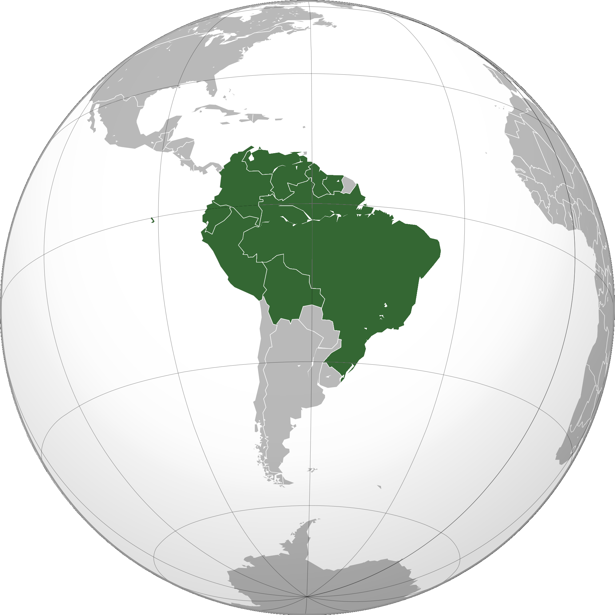 Legenda: Laranja: Estados Membros da OTCA